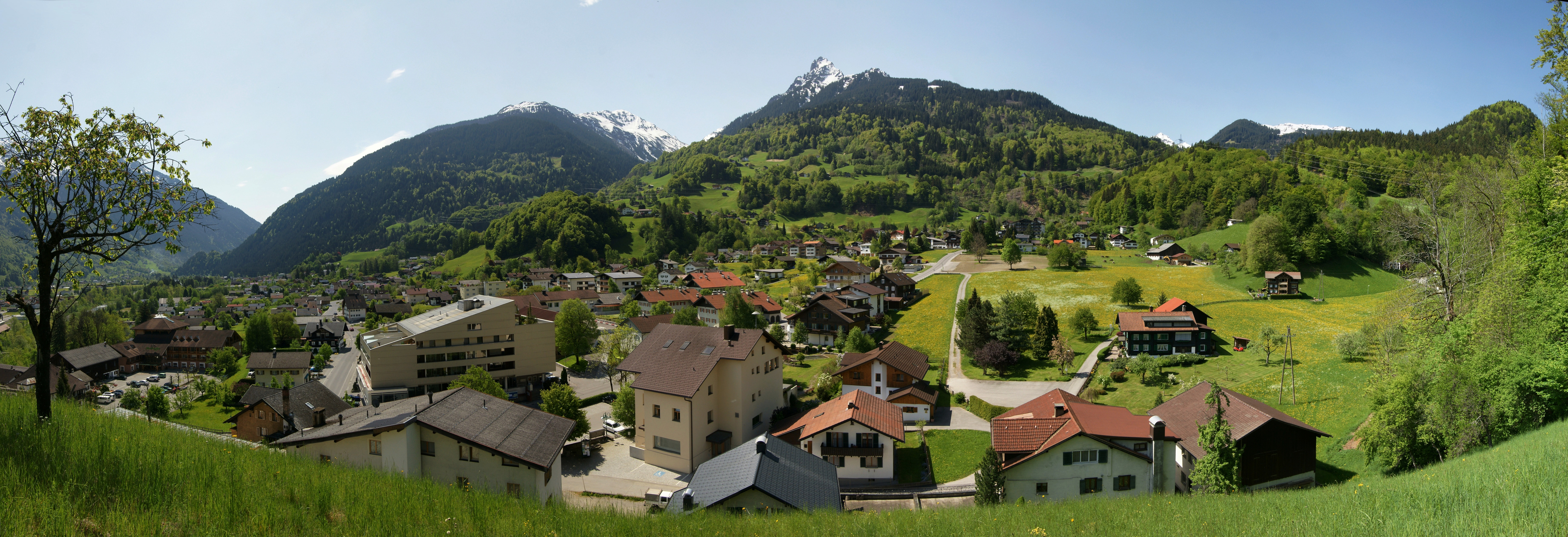 Blick von Mottabühl auf das Kirchdorf von Tschagguns in Vorarlberg In der Bildmitte ragt die Tschaggunser Mittagspitze 2.168m hervor.